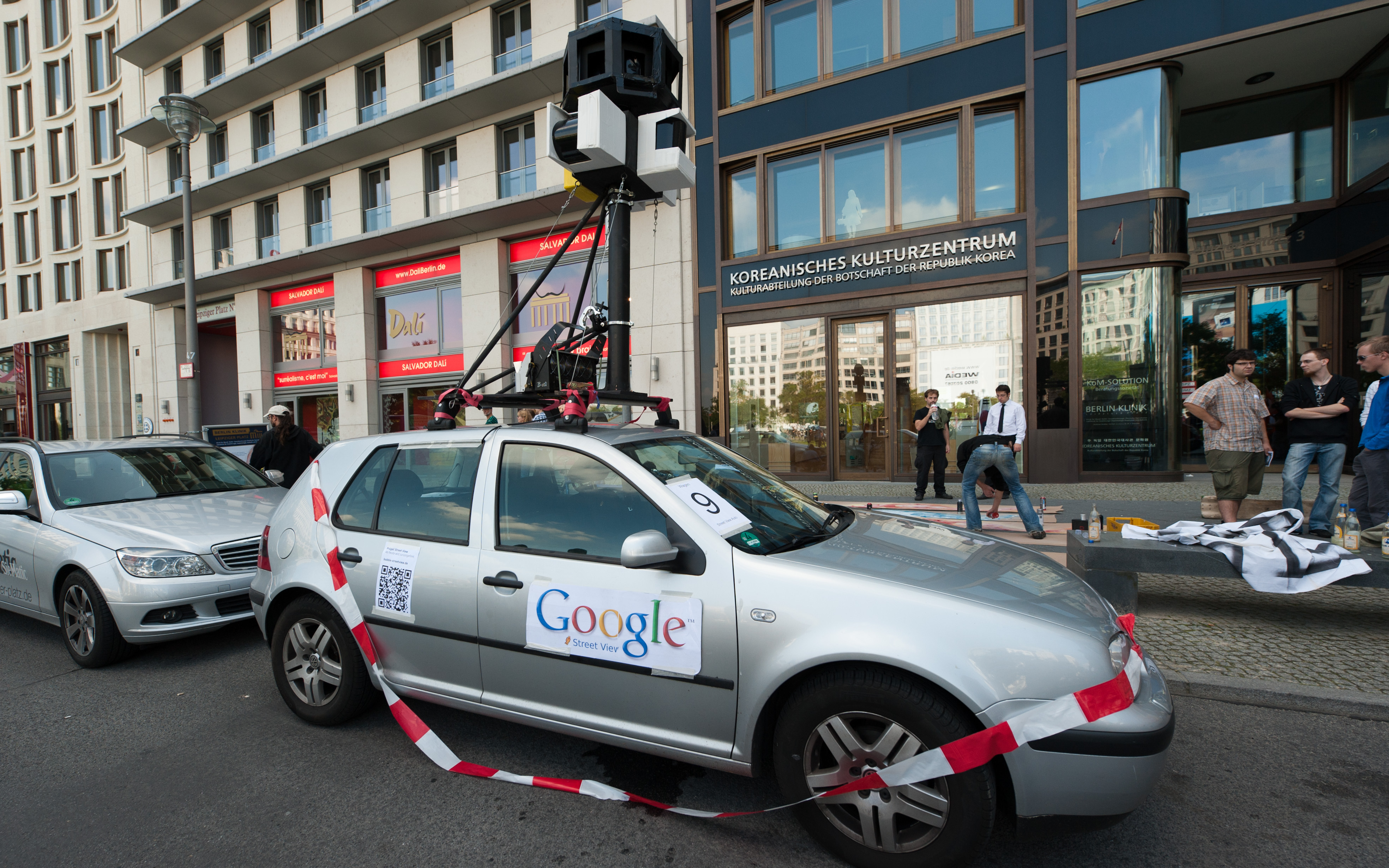 Freiheit-statt-Angst-Demo, Berlin, 11. September 2010. Google-Street-View-Attrappe]